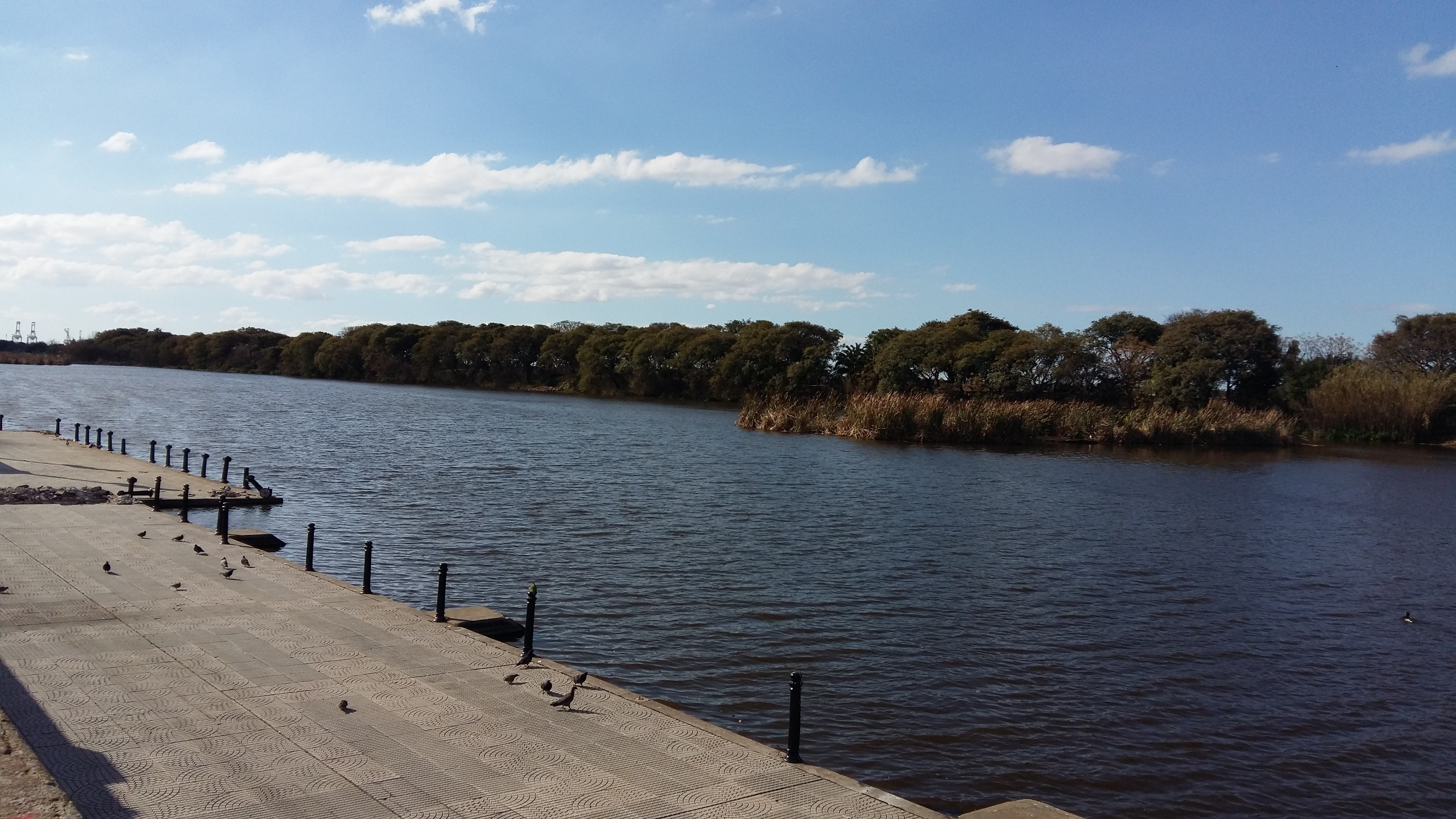 Vista exterior de la Reserva Ecológica Costanera Sur, CABA, Argentina. La reserva ecológica está ubicada a metros de la zona del centro de la ciudad. Pese a múltiples incendios intencionales e intentos de privatización, la comunidad y organizaciones ambientalistas han conseguido mantenerla en pie.